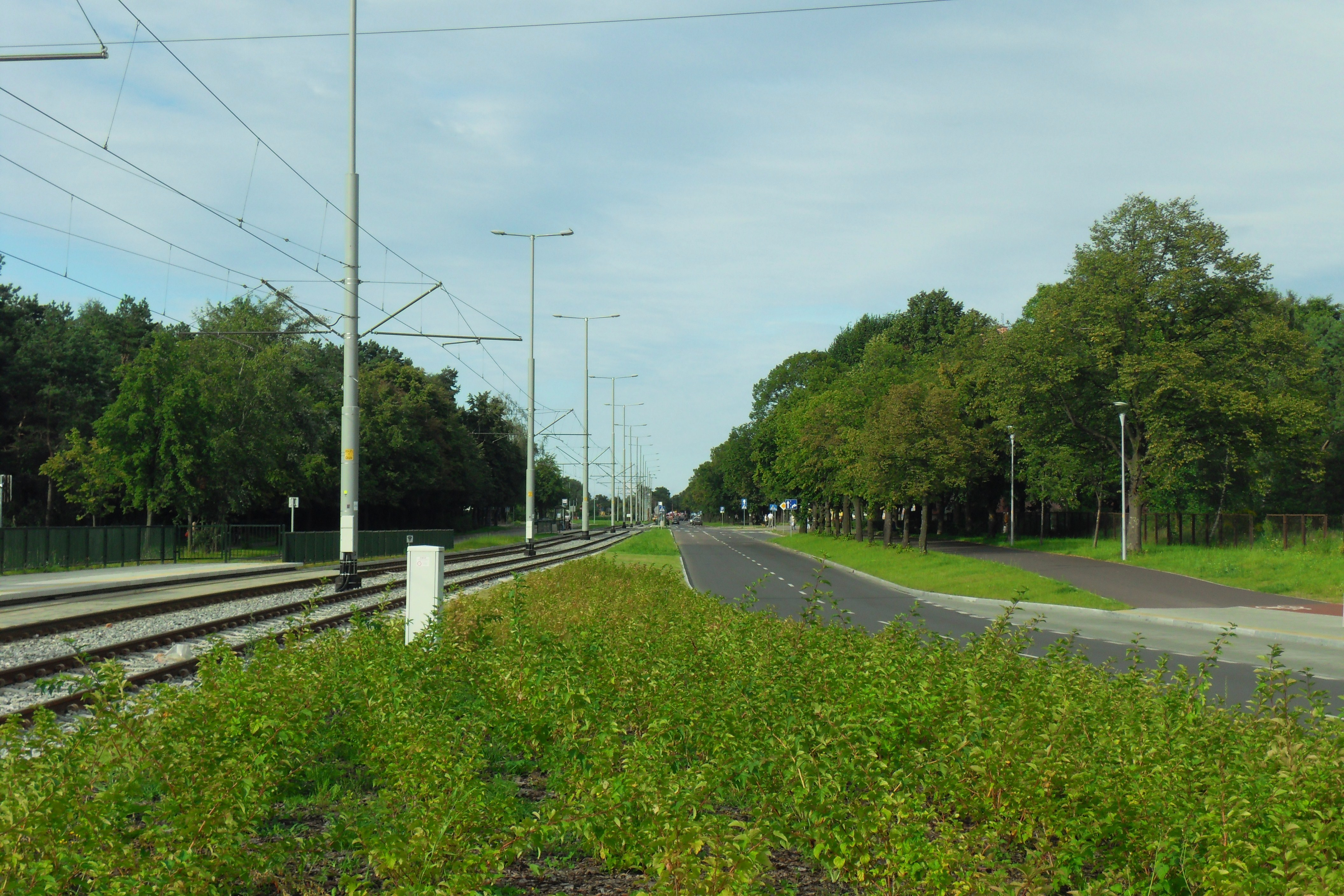 Gdańsk Brzeźno, al. Hallera.